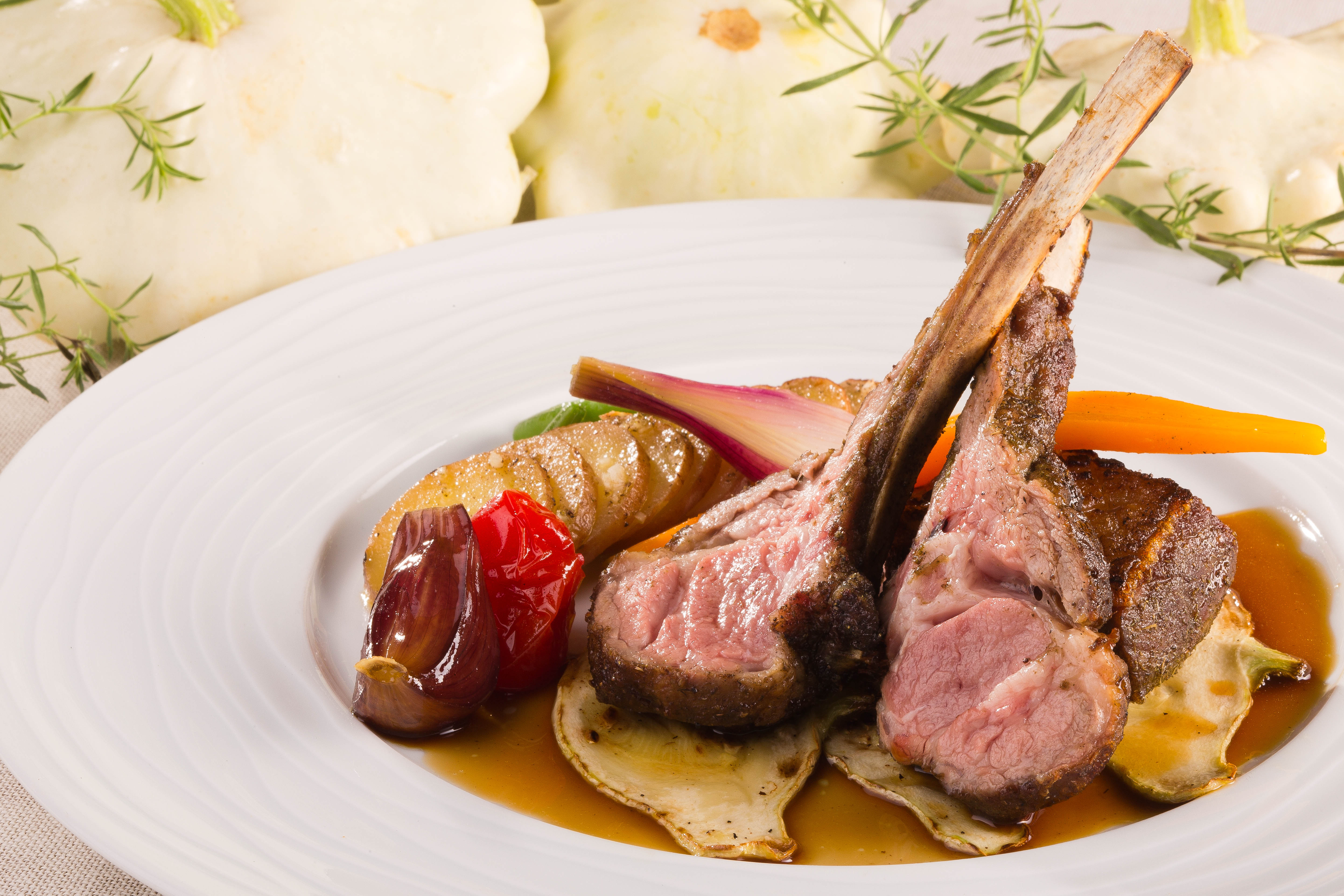 Côtes d'agneau de Sisteron et ses petits légumes d'été